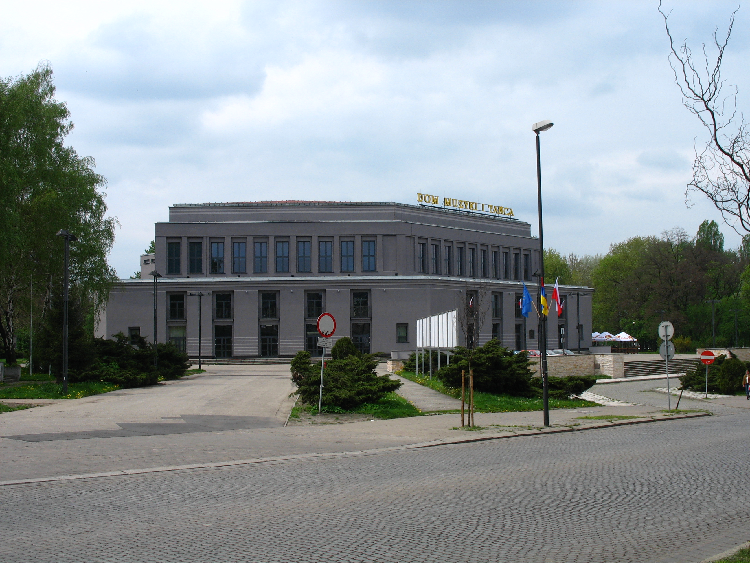 Dom Muzyki i Tańca, Zabrze